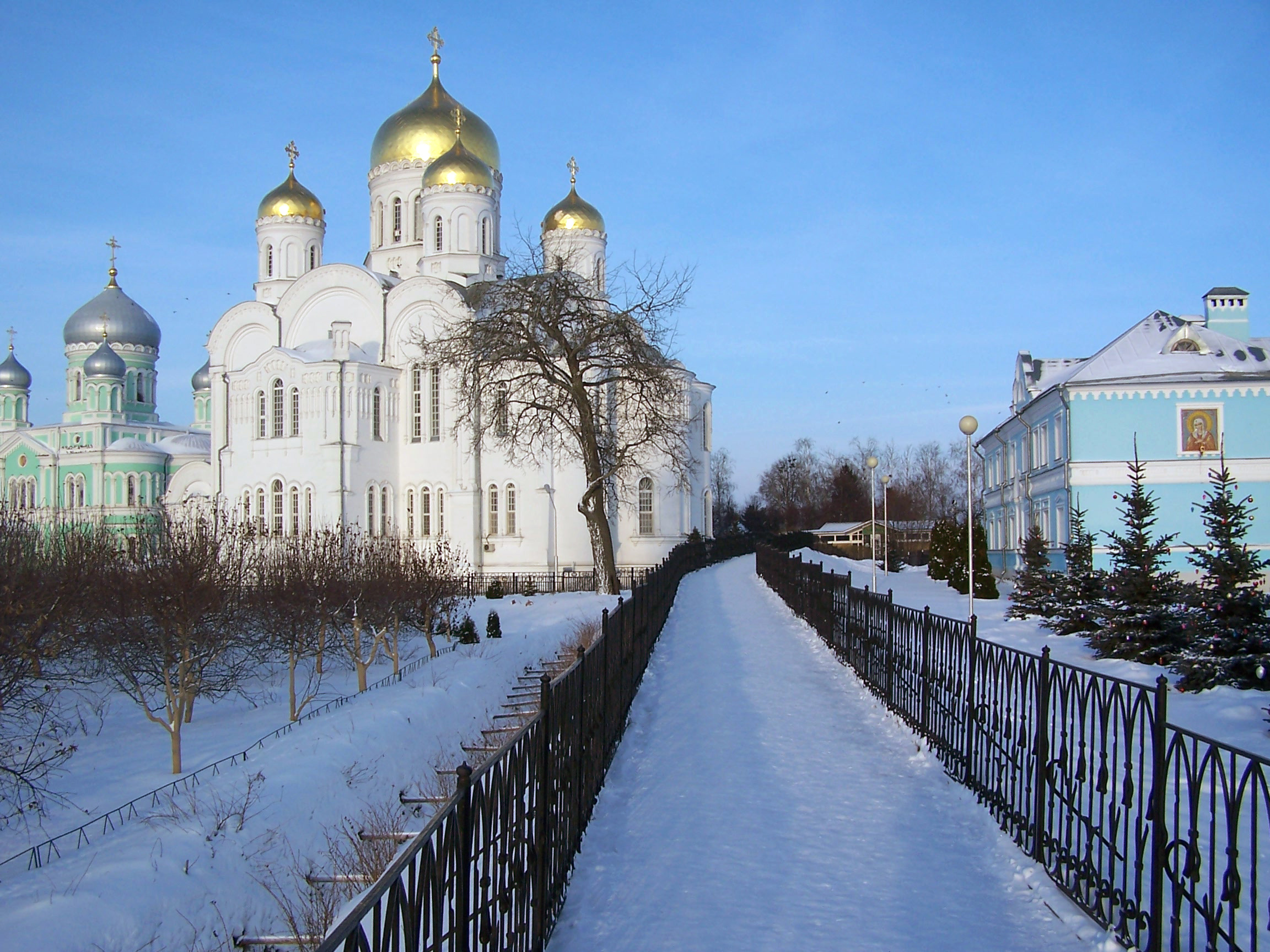 Св. Канавка